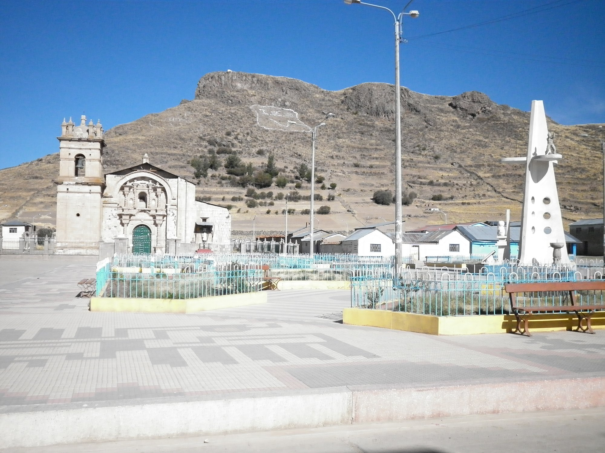 Plaza Principal Vilque.